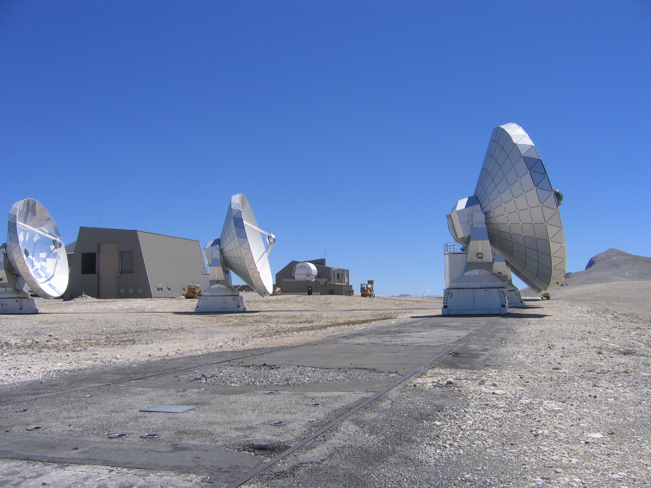 Radiotélescopes du Plateau de Bure